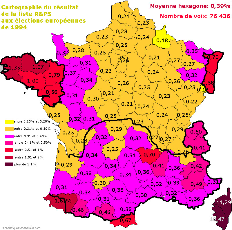 Résultat de la liste Régions et Peuples Solidaires par département